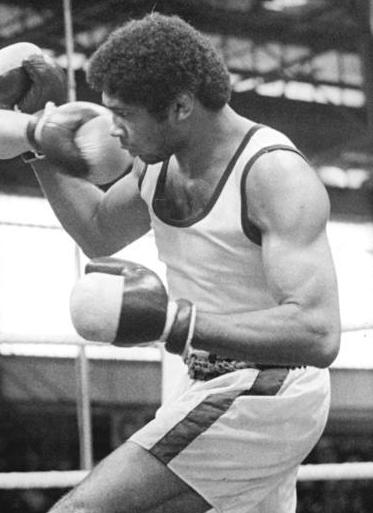 Detlef Kästner, Armando Martinez ADN-ZB Lehmann 13.3.82 Halle: XI. Internationales Boxturnier um den Chemiepokal-Finale - Im Halbmittelgewicht lieferte der 23-jährige Olympiadritte Detlef Kästner (DDR-links) dem Olympiasieger von Moskau, Armando Martinez (Kuba), eine kämpferisch ausgezeichnete Partie und unterlag nur äußerst knapp mit 2:3-Richterstimmen nach Punkten.